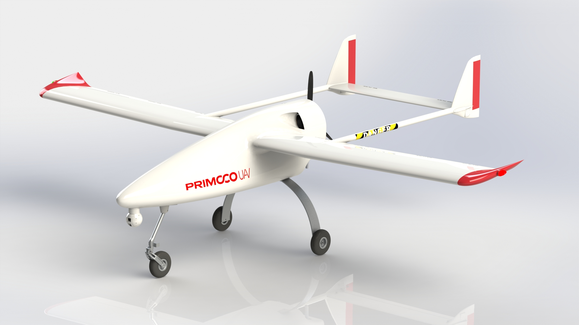 Bezpilotní letoun Primoco UAV